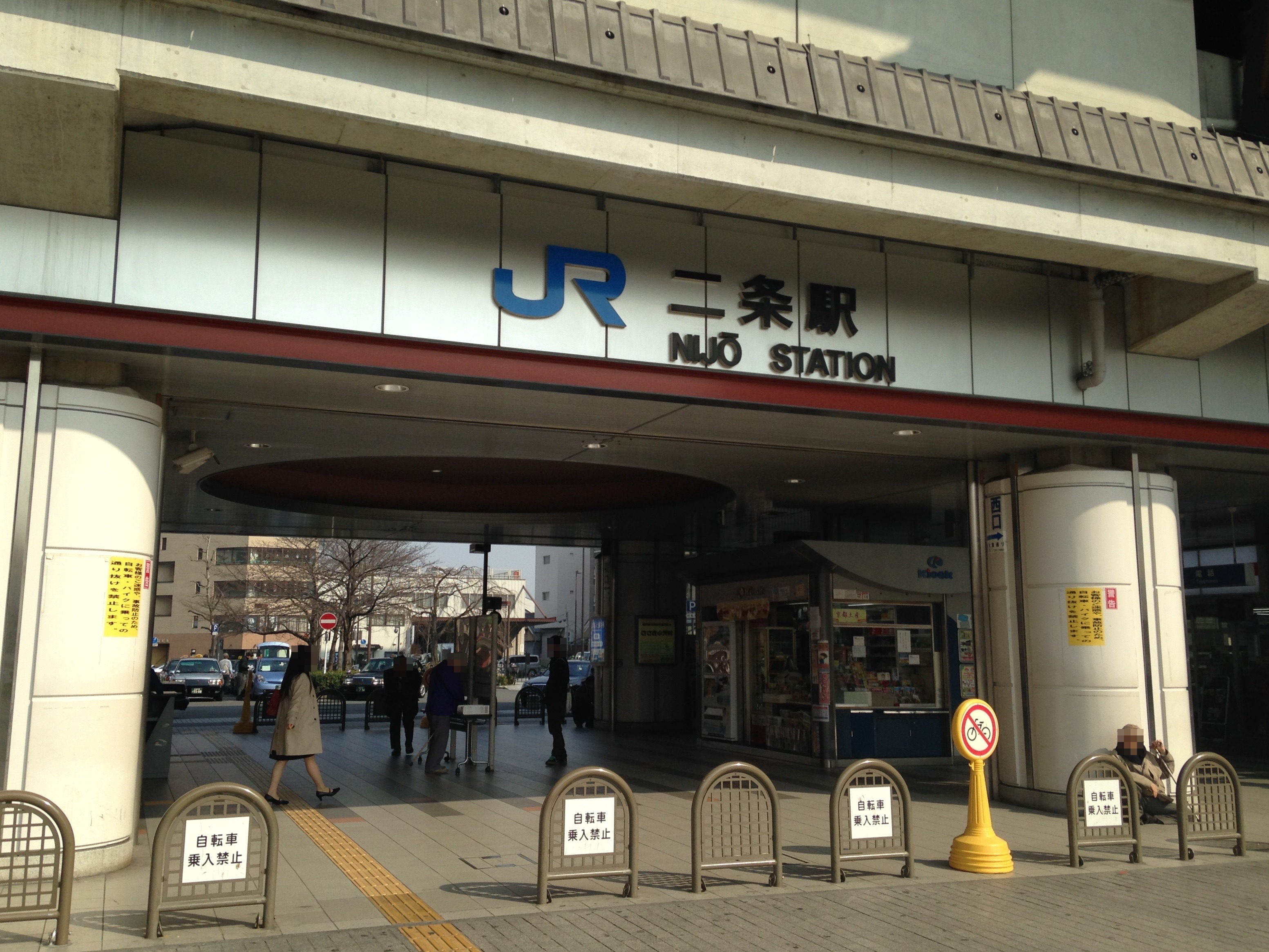 JR二条駅・西口